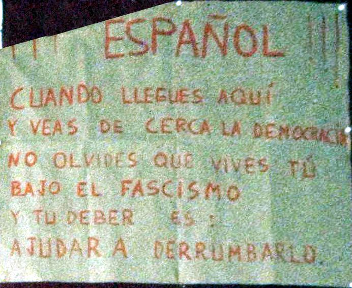 Cartel en una oficina del Partido Socialista de Portugal, fotografado en 1975: ¡¡¡Español!!! Cuando llegues aquí y veas de cerca la democracia no olvides que vives tú bajo el fascismo y tu deber es: ajudar a derrubarlo.